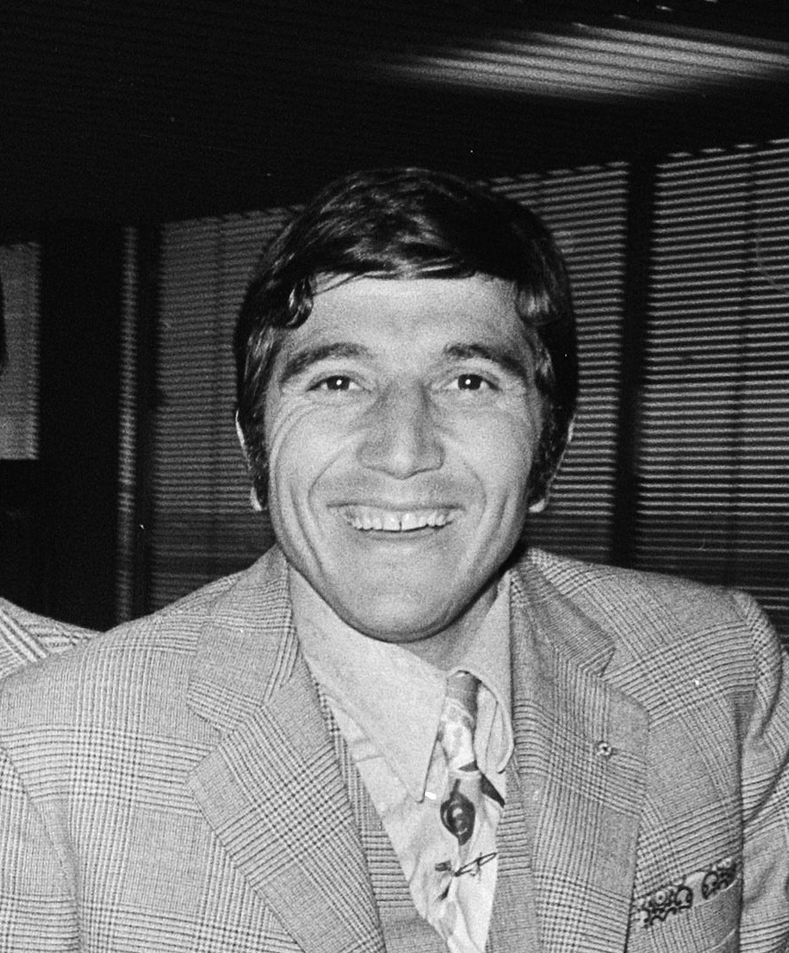 Aankomst op Schiphol van het elftal van Atletico Madrid voor de wedstrijd tegen Ajax. Iselín Santos Ovejero